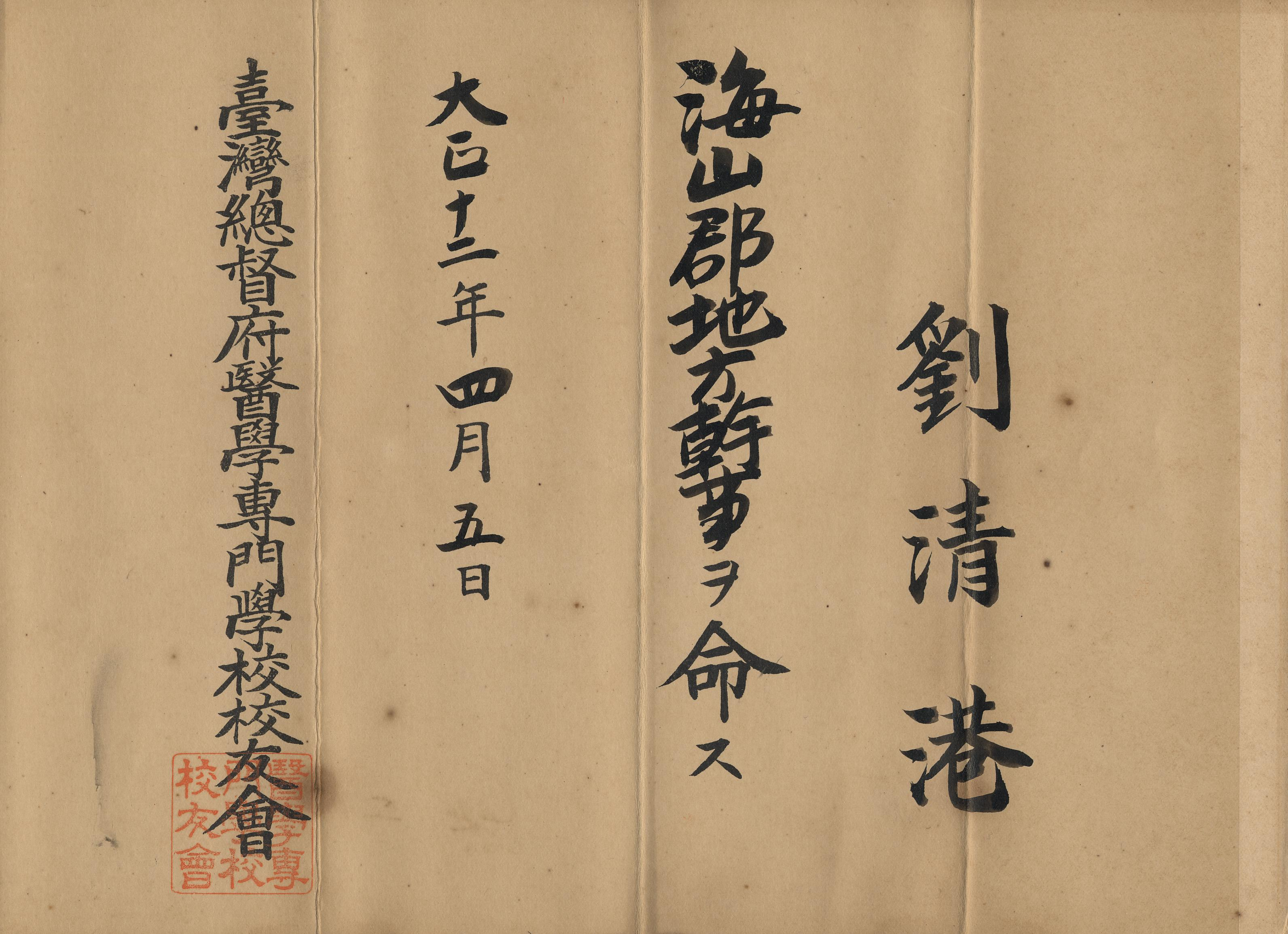 1923年（大正十二年）臺灣總督府醫學專門學校校友會任命劉清港擔任海山郡地方幹事